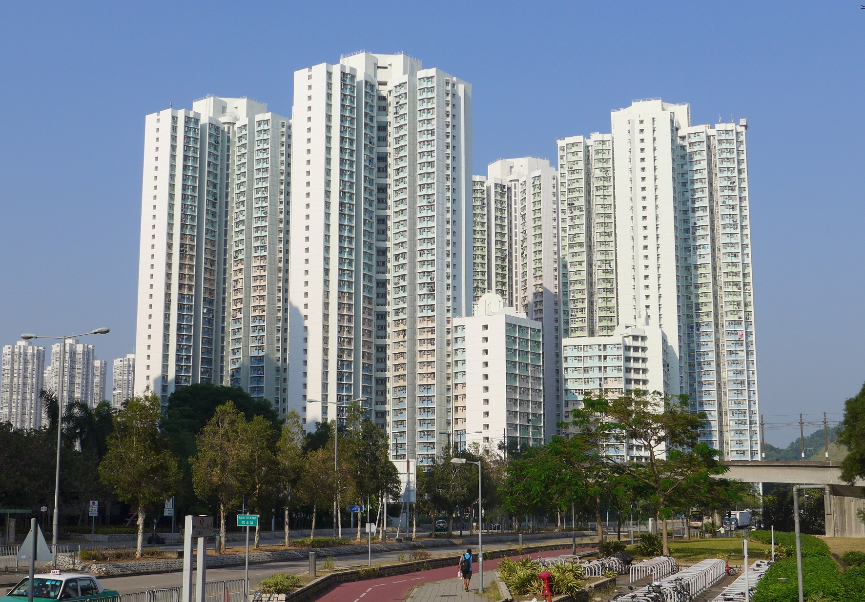 Tin Tsz Estate 天慈邨